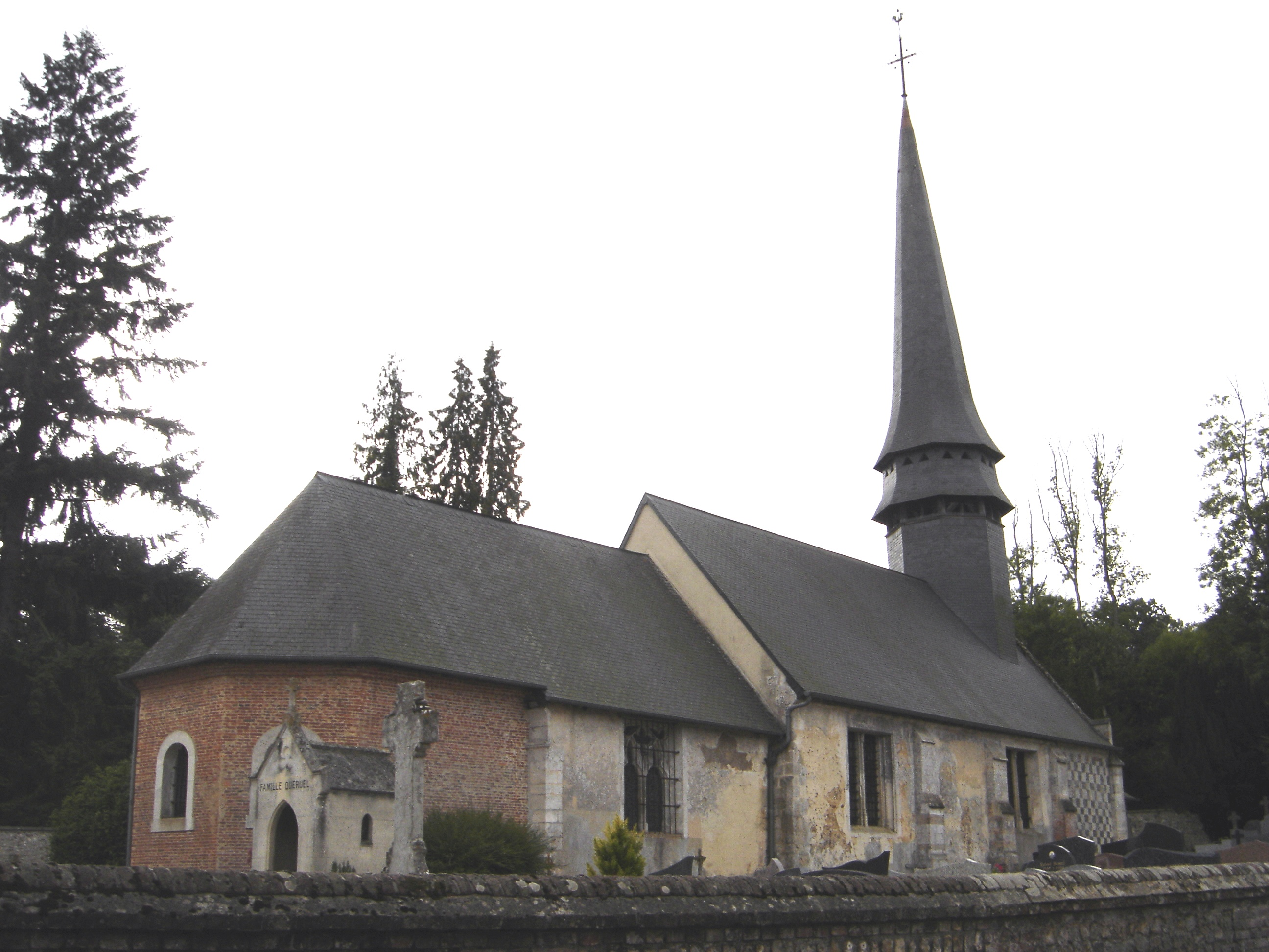 église de Giverville - Eure - France